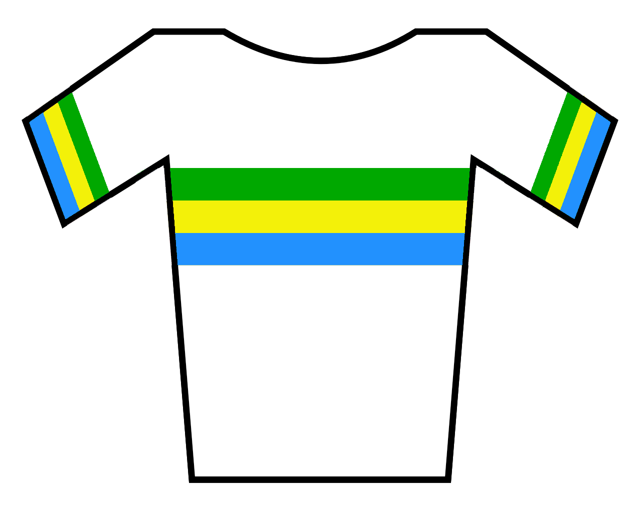 Maillot de Brasil